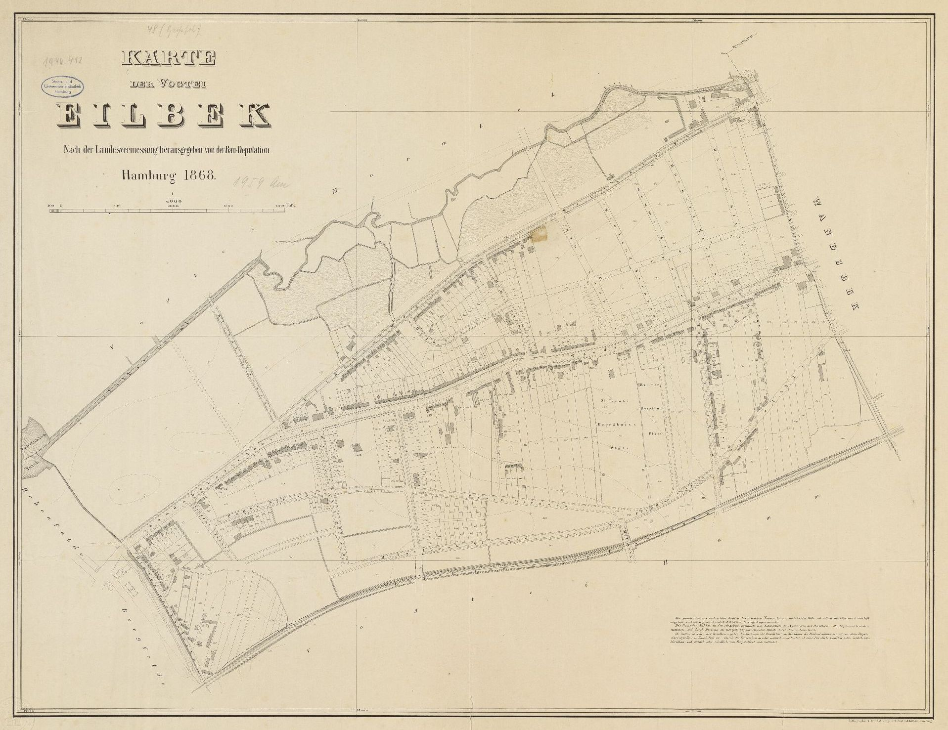 Karte der Vogtei Eilbek, 77 x 60 cm